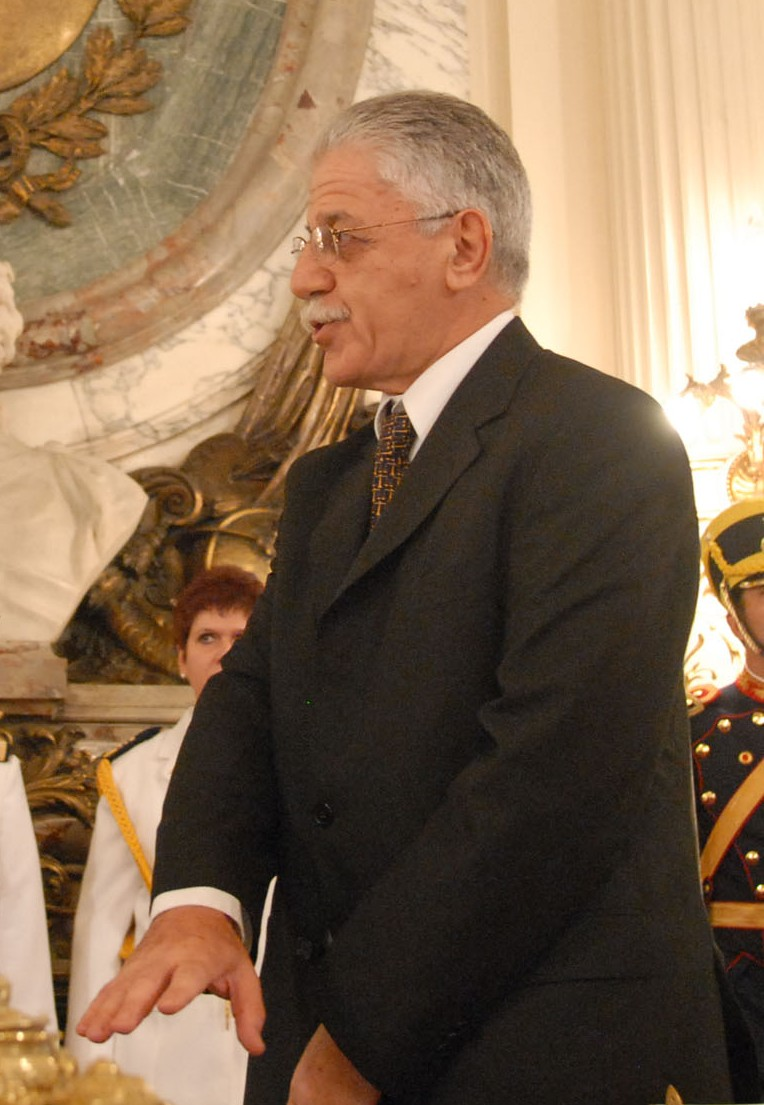 Juan Carlos tedesco, ministro de educación de Argentina desde 2007